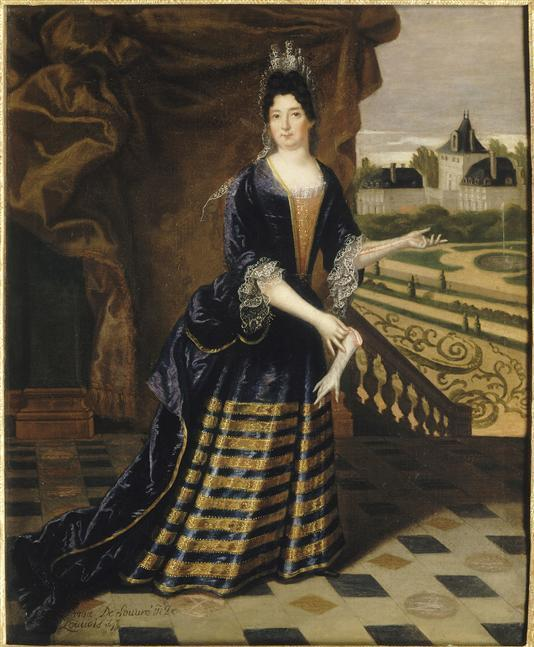 Epouse en 1662 du ministre François-Michel le Tellier, Marquis de Louvois